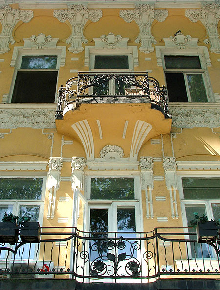 rustavelis prospekti